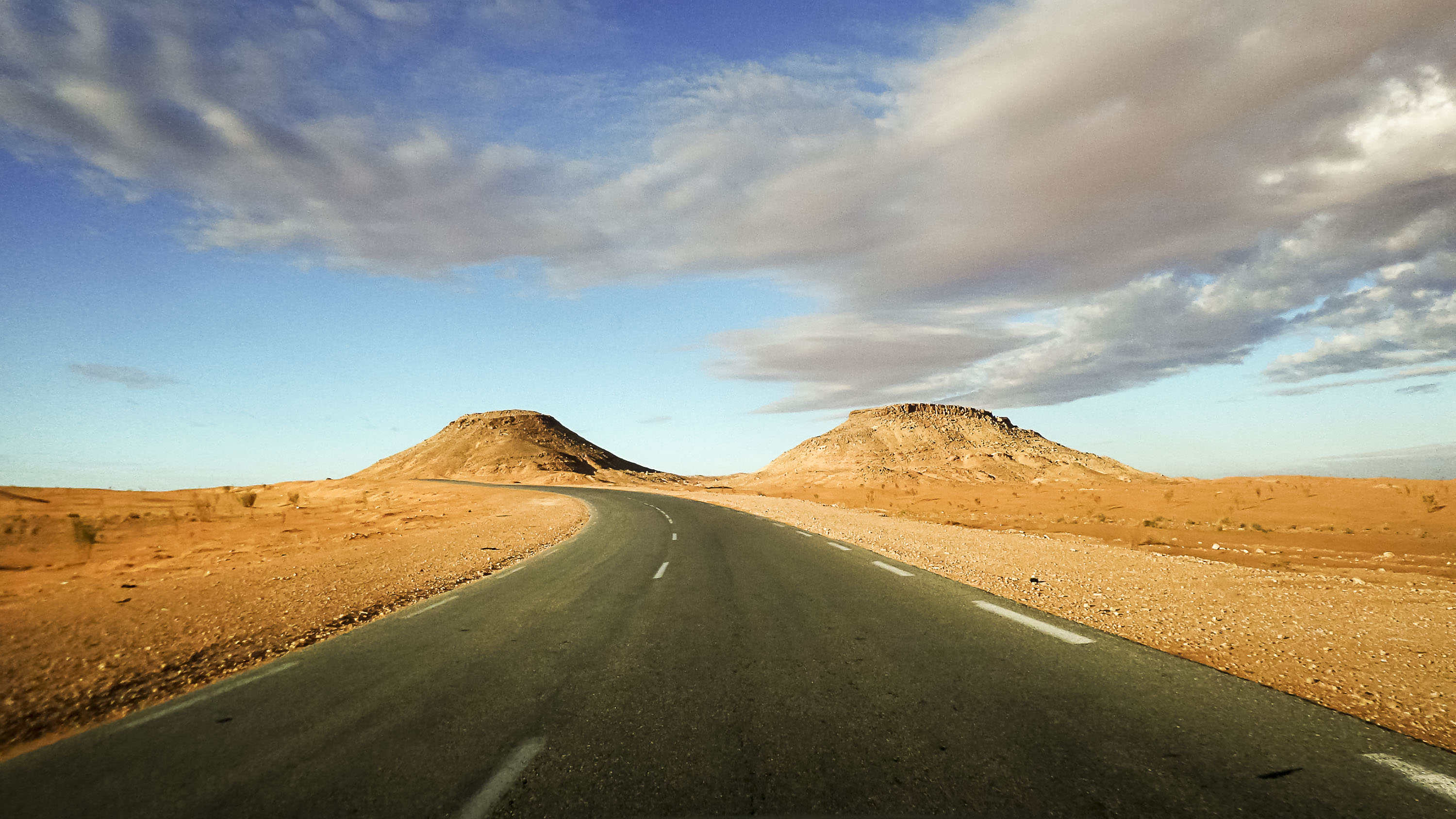 Rn 1, El Menea, wilaya de Ghardaia - Algérie المنيعة بولاية غرداية - الجزائر